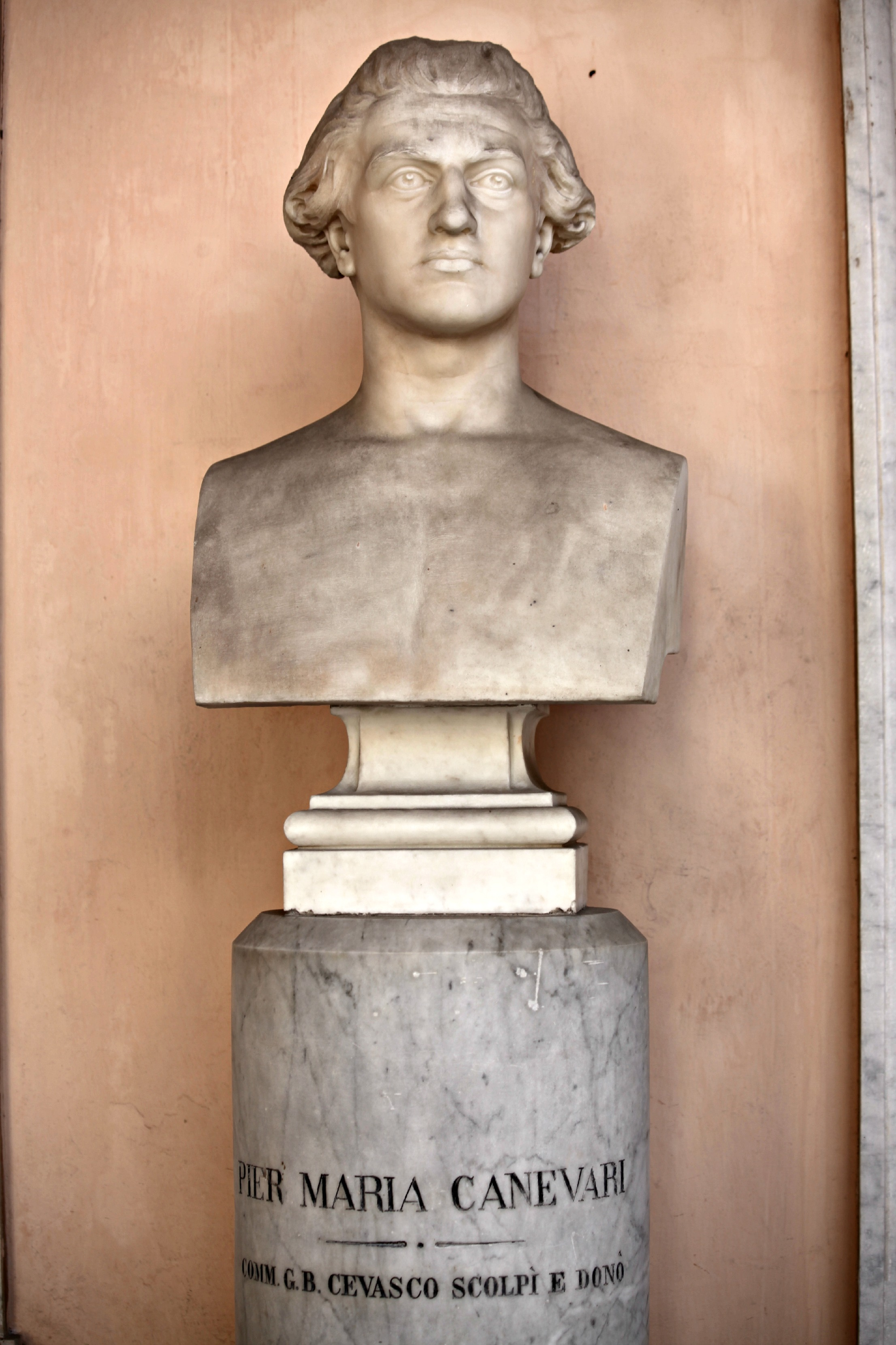 Palazzo Doria-Tursi - Musei di Strada Nuova This is a photo of a monument which is part of cultural heritage of Italy.